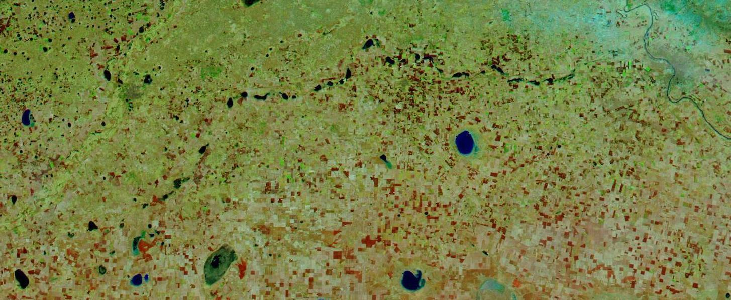 снимок Камышловского лога